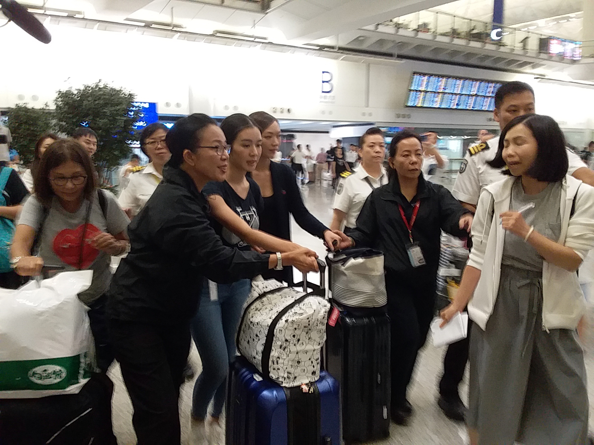 2019年7月30日，2019年度《香港小姐》境外拍攝特備節目之參演嘉賓麥明詩及馮盈盈從日本返回香港，並於工作人員協助下離開香港國際機場一號客運大樓